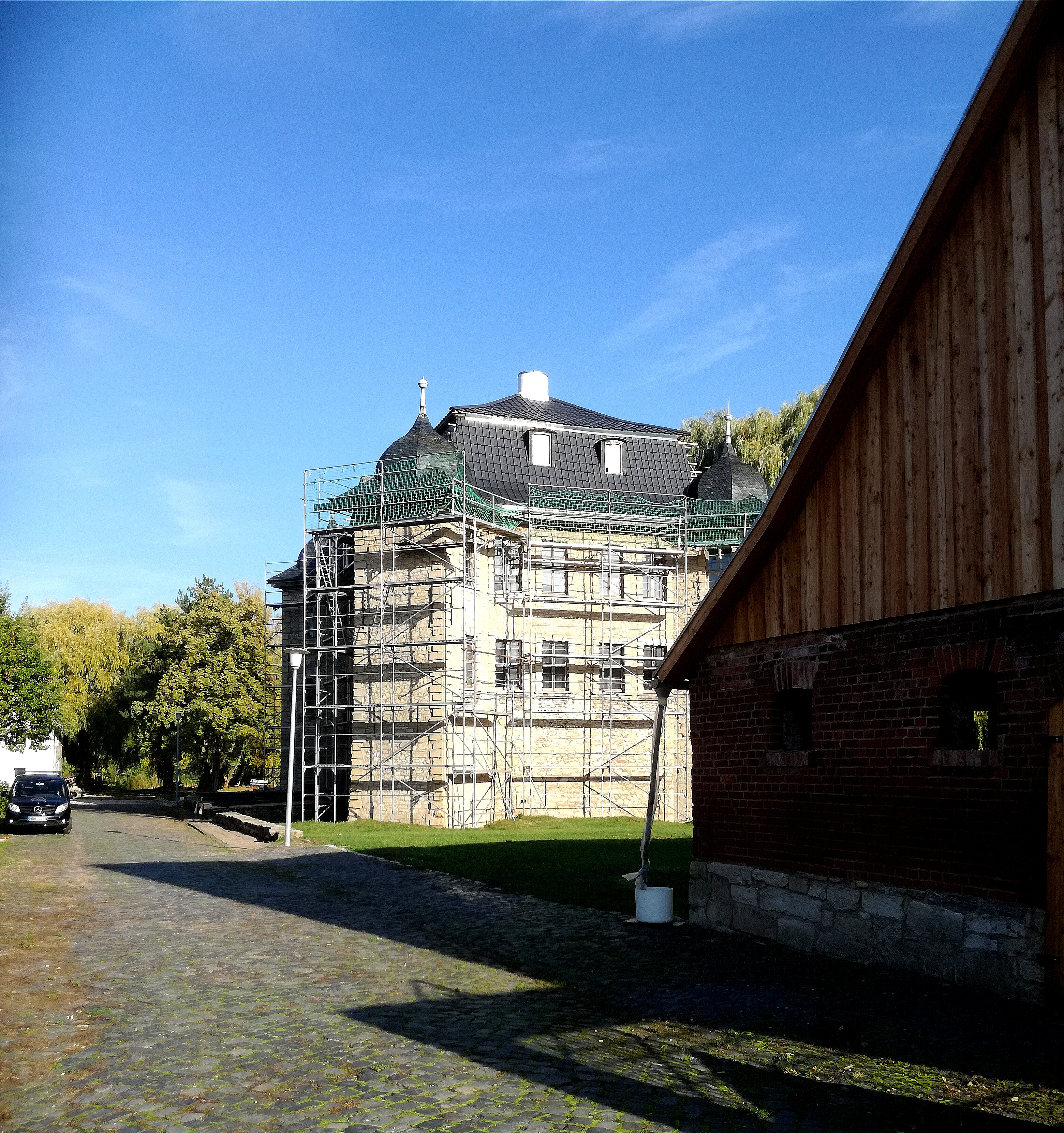 Das Wasserschloss in Niedergebra 2019